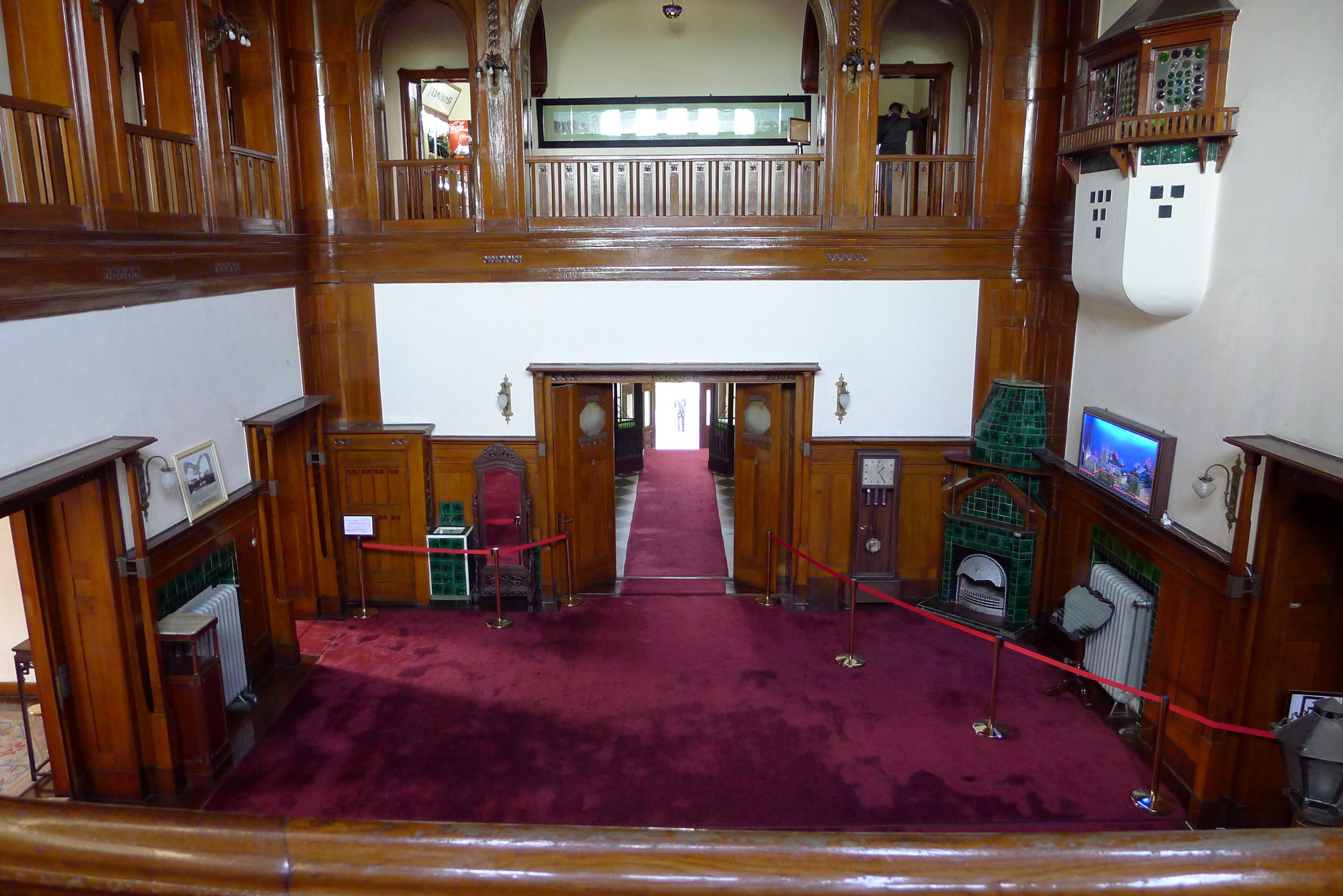 青岛总督官邸内部